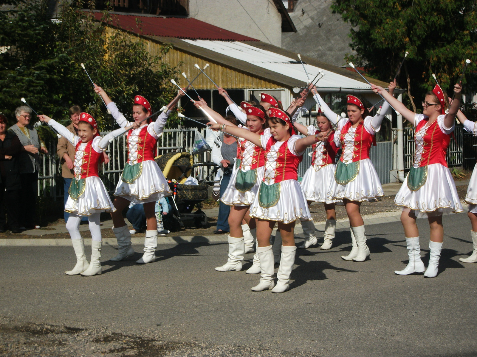 A zichyújfalui mazsorettcsoport Zichyújfaluban a szüreti felvonuláson.